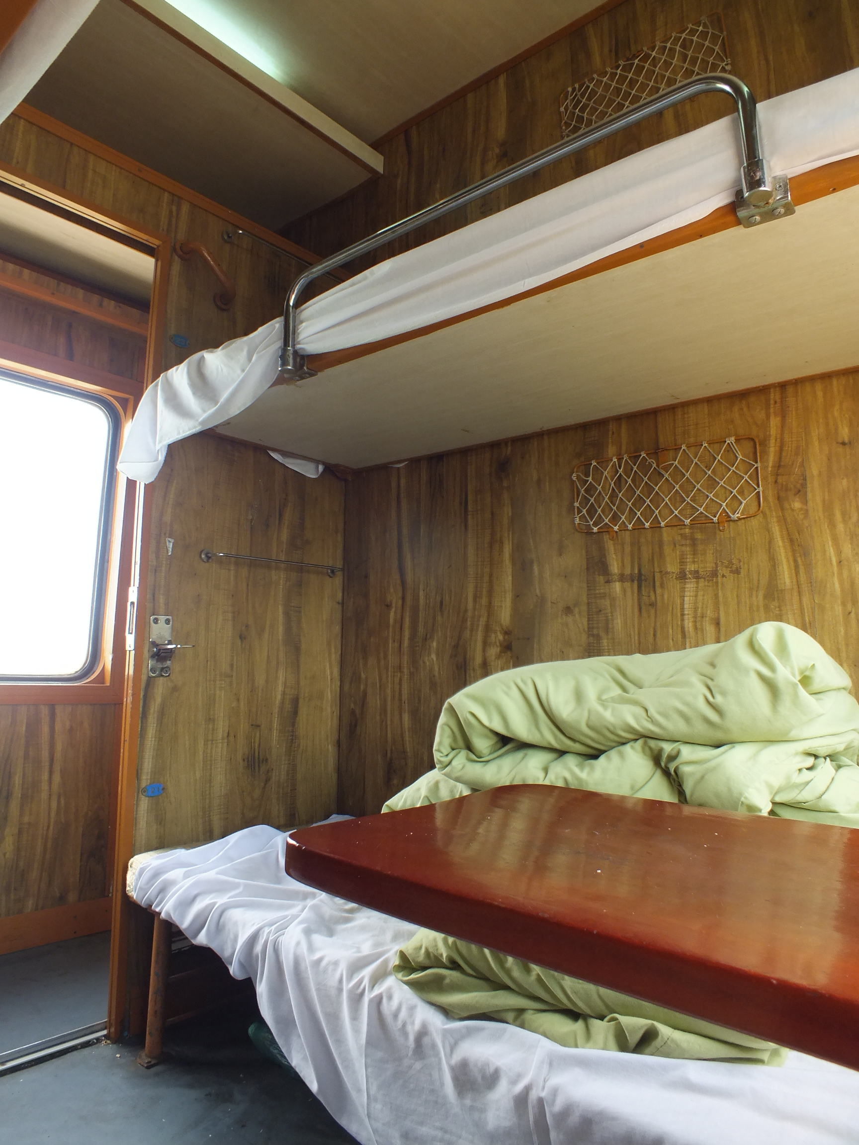 2013-07-16 North–South Railway (Vietnam)SE20